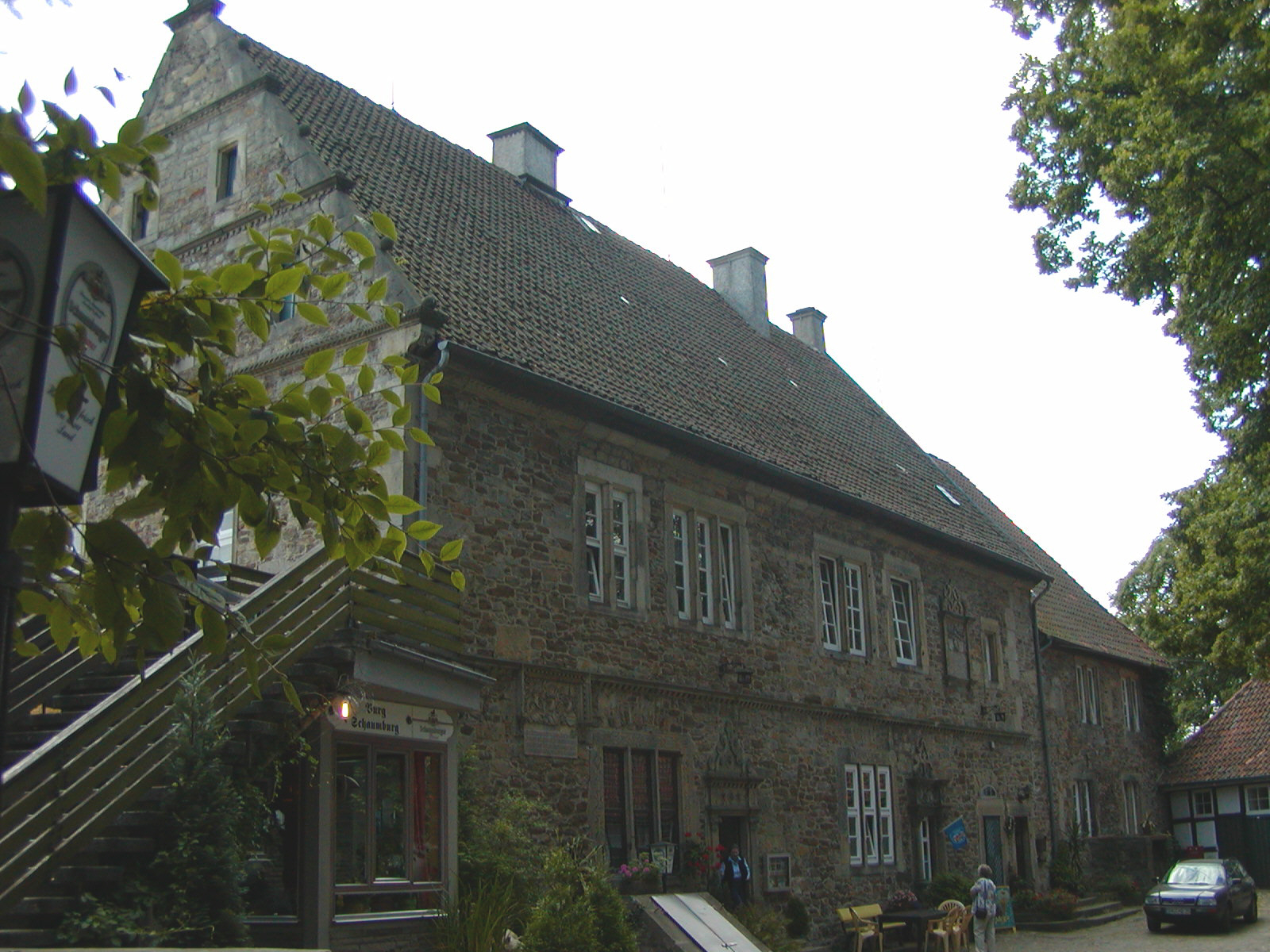 castle Schaumburg, Weserbergland, Germany